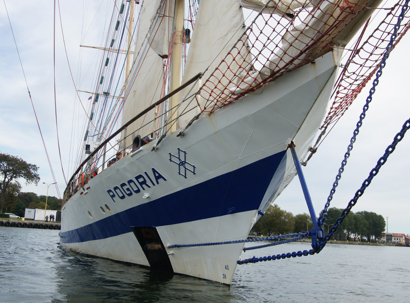 Szkoła pod Żaglami jesień 2012 - Pogoria od dziobu w basenie portowym w Świnoujściu